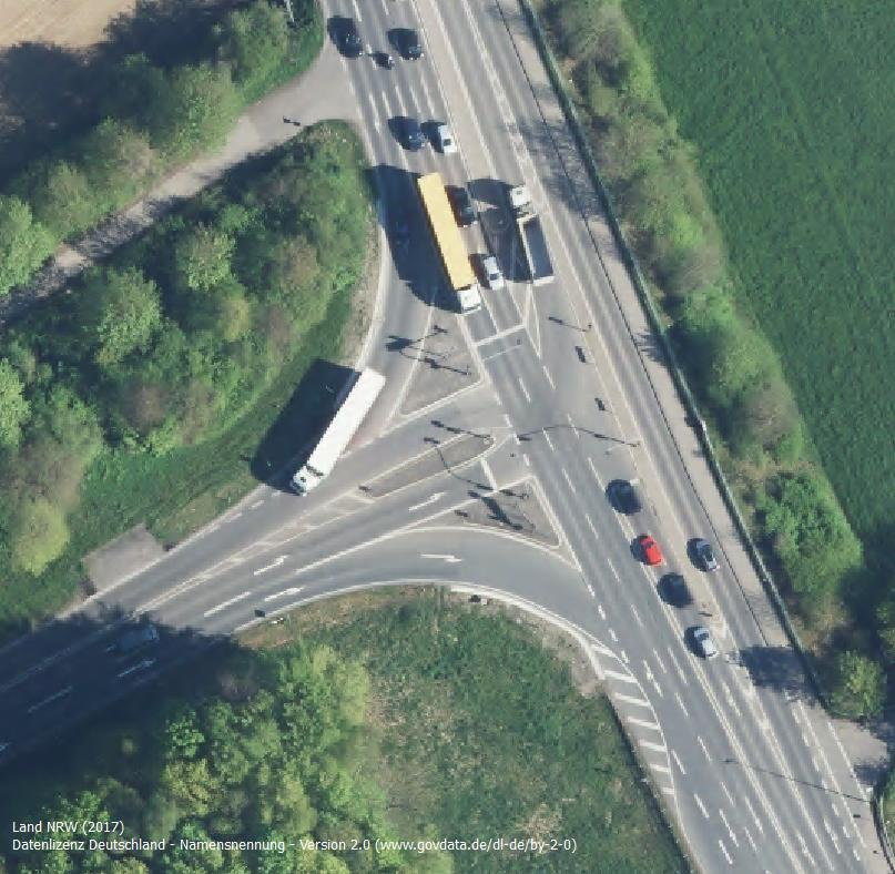 Orthofoto A 544 Aachen Anschlussstelle Würselen nördlicher Teilknoten